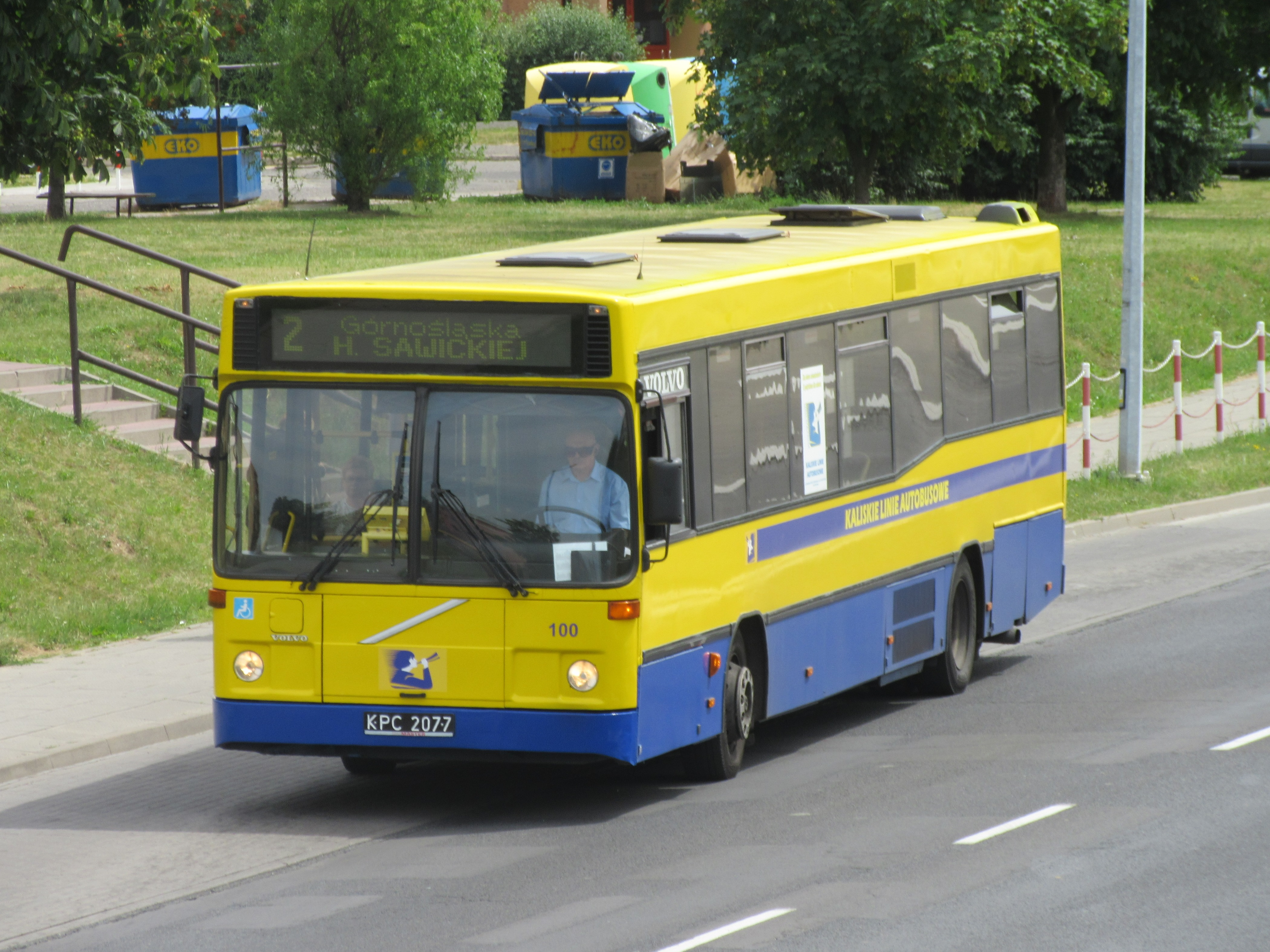 Volvo B10BLE Kaliskich Linii Autobusowych na przystanku Sawickiej Arena (ob. Wyszyńskiego Arena) w Kaliszu; pierwszy autobus niskopodłogowy w Kaliszu